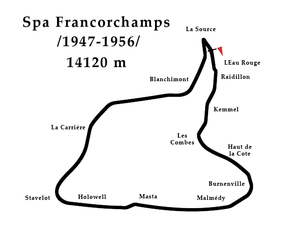 Plánek trati v Spa (Formule 1 se na této trati jela v letech 1947-1956).